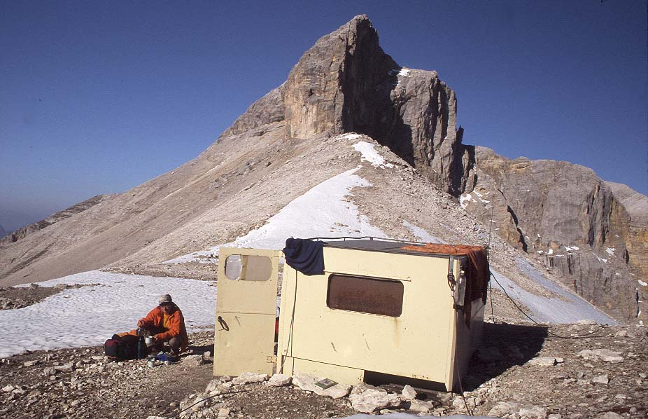 Biwakschachtel an der Breitgrieskarschachtel, Karwendel * selbst fotografiert (September 2003) * Lizenz: GNU-FDL